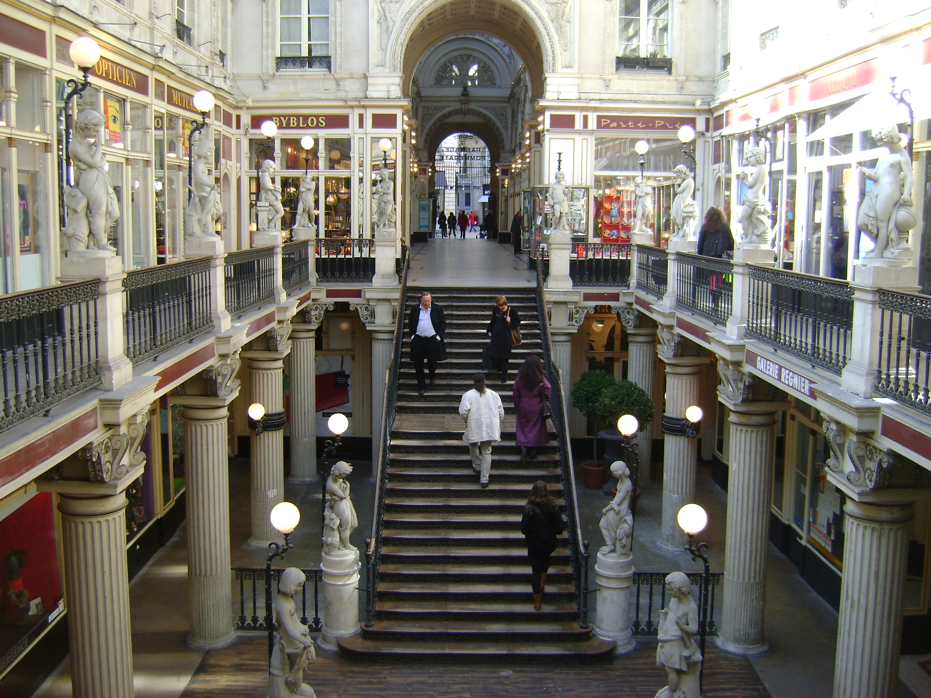 Le passage Pommeraye à Nantes. Vu depuis l'escalier. .